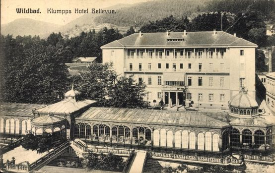 Ansichtskarte